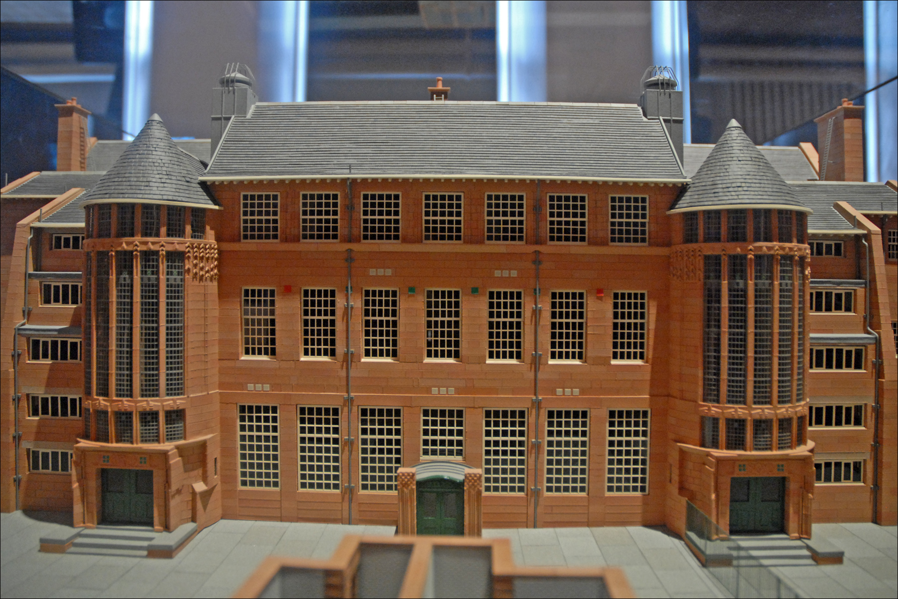 Maquette de l'école conçue par Mackintosh. Cette construction a été la dernière commande importante de la ville de Glasgow reçue en 1903-1906 par l'architecte. L'Ecole est de conception traditionnelle pour l'époque, avec à gauche, la partie réservée aux garçons et à droite celle réservée aux filles. Chaque partie dispose d'un escalier que l'architecte a placé dans une tour vitrée et décorée. Les salles de classe occupent les deux étages du haut. A l'arrière, se trouvent deux cours de récréation séparées par un mur. Le style de cette école est inspiré de l'architecture rurale traditionnelle écossaise. D'une manière générale, la réalisation est très soignée et le traitement de la lumière est parfaitement maitrisé. Cette école est devenue un musée de l'éducation en Ecosse depuis 1872, l'époque victorienne, aux années 1960. Le musée comprend des salles de classe de 4 périodes différentes reconstituées, des dioramas présentant les personnages principaux d'une école à savoir le directeur, l'institutrice, le gardien, l'infirmière, la salle (cuisine) destinée à l'apprentissage des filles des travaux ménagers, un centre d'interprétation de l'oeuvre de l'architecte et de l'histoire de l'école en Ecosse, une salle d'exposition temporaire, une cafétéria et une boutique.